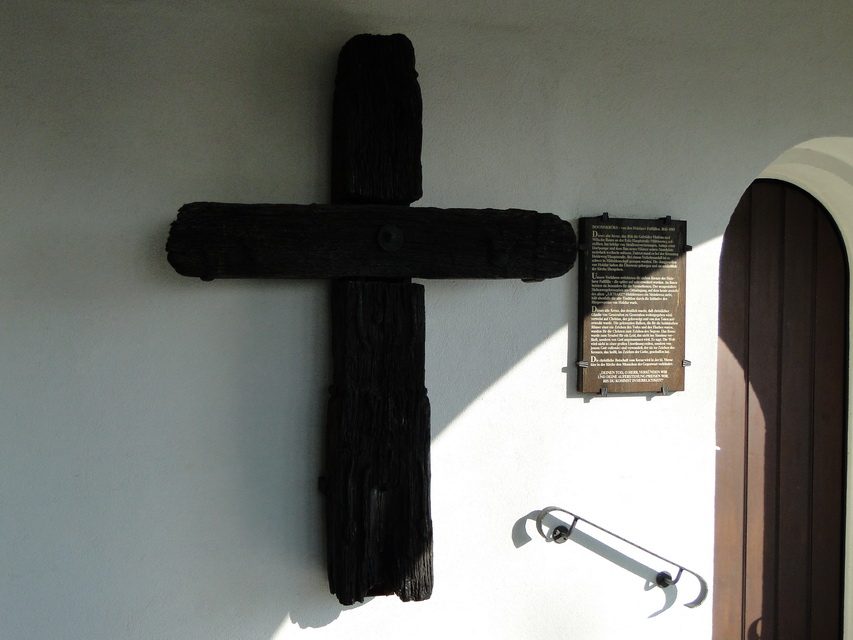 as Boomskröks genannte Wegekreuz war einst eins der sieben (später acht) Kreuze der Holzlarer Fußfälle. Es wurde 1816 an der Ecke Hauptstraße und Mühlenweg errichtet. Das Kreuz wurde mehrfach umgesetzt und stand zuletzt an der Ecke Heideweg und Hauptstraße, dort wurde es bei einem Verkehrsunfall schwer zerstört. Die Überreste wurden durch die Holzlarer Junggesellen geborgen und der Kirche übergeben.